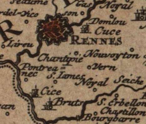 Extrait de la Tabula ducatus britanniae gallis. Le gouvernement général de Bretagne in suos novem episcopatus omnes Turonensi Aurel. Extrait centré sur le sud de Rennes. On voit notamment les communes actuelles de : Bourgbarré (Bourgbarre), Bruz (Bruts), Chantepie (Chantipie) Domloup (Domlou), Nouvoitou (Nouvoyton), Noyal-Châtillon-sur-Seiche (Noyal), Saint-Erblon (S. Erbellon), Saint-Jacques-de-la-Lande (S. Iames), Vern-sur-Seiche (Vern), etc.